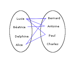 Diagramme d'une relation binaire. Image personnelle. Licence GFDL.